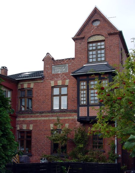 Ejendom i Eberts Villaby, Amager, København.